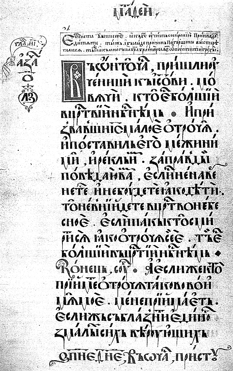 Страница из «Пересопницкого евангелия» 1556—1561 гг. Рис. 138 (стр. 87) из: М. Г. Рiзник, Письмо i шрифт, К.: Вища школа, 1978.